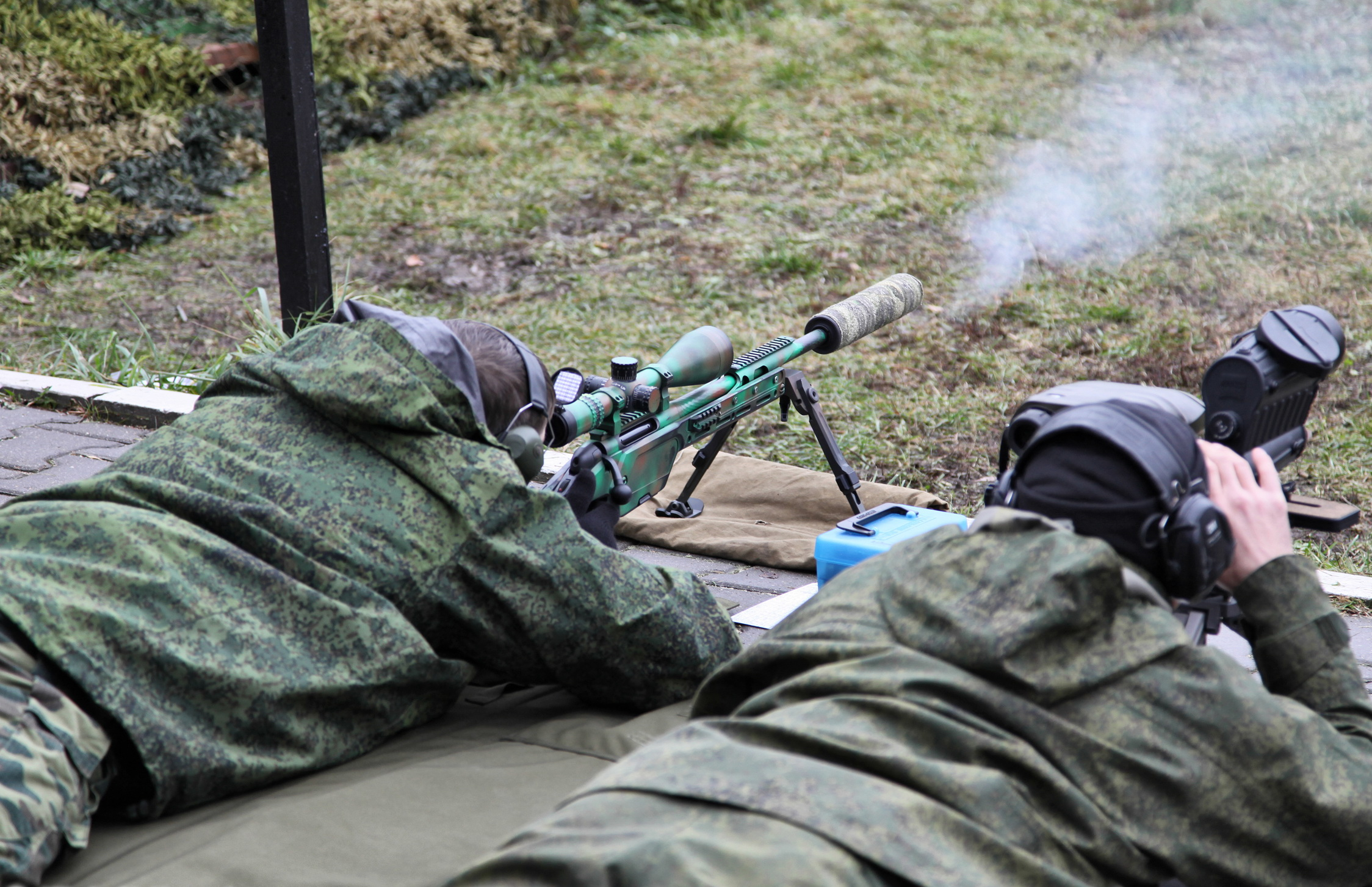 Steyr SSG 08 .300 Win.Mag